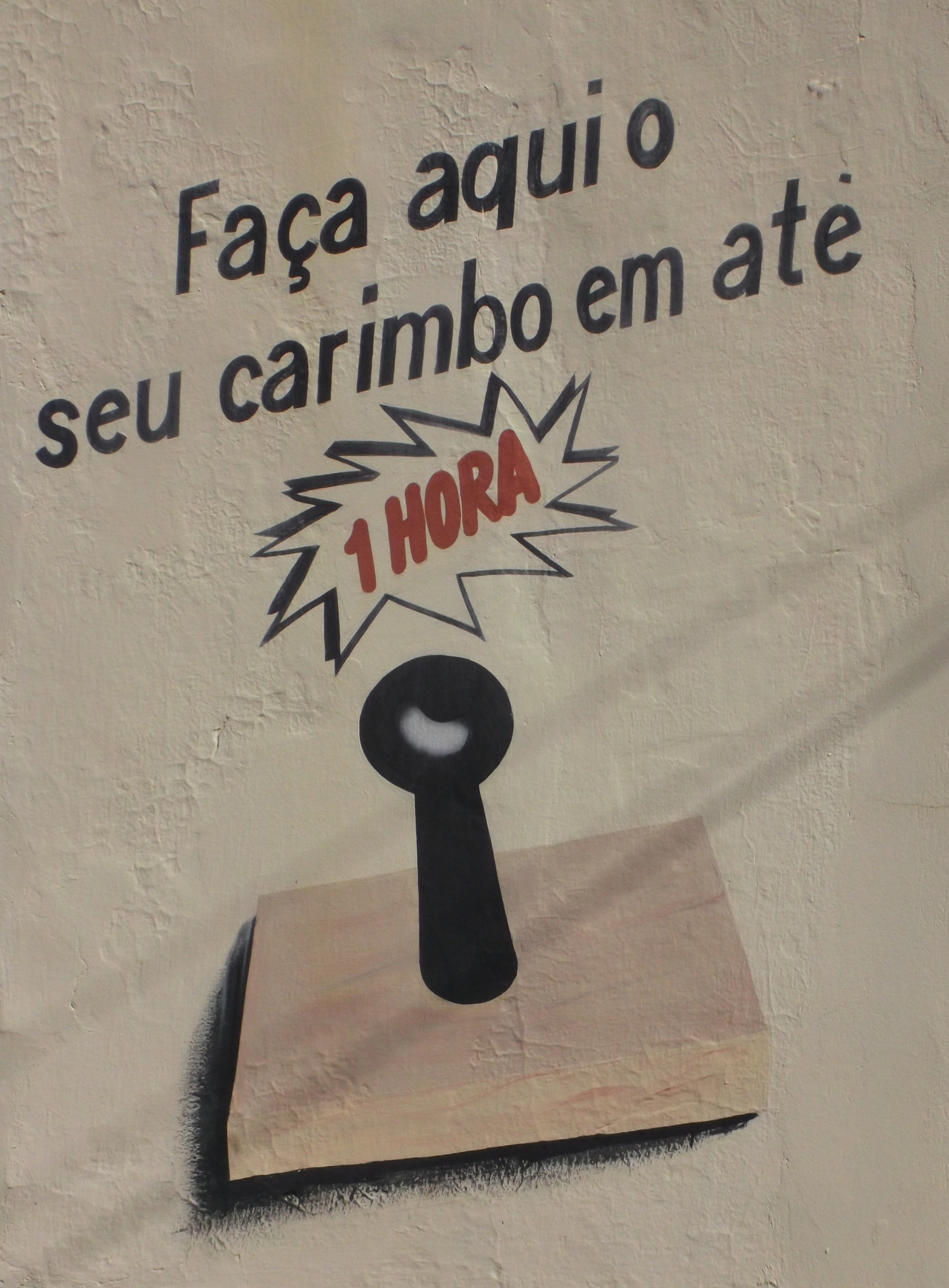 Desenho pictórico de um carimbo em frente a uma gráfica que confecçiona tais peças, em uma cidade do Piauí.